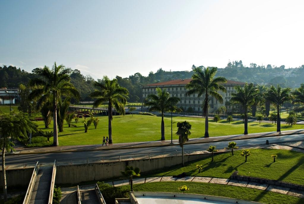 Jardines de la Universidad Simón Bolívar vistos desde la Escultura Hidrocinética